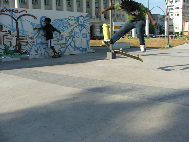 Tauan - hellflip